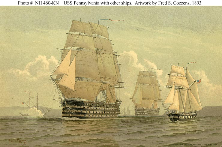 Der "Vierdecker" USS Pennsylvania (mitte) mit Flottenverband.